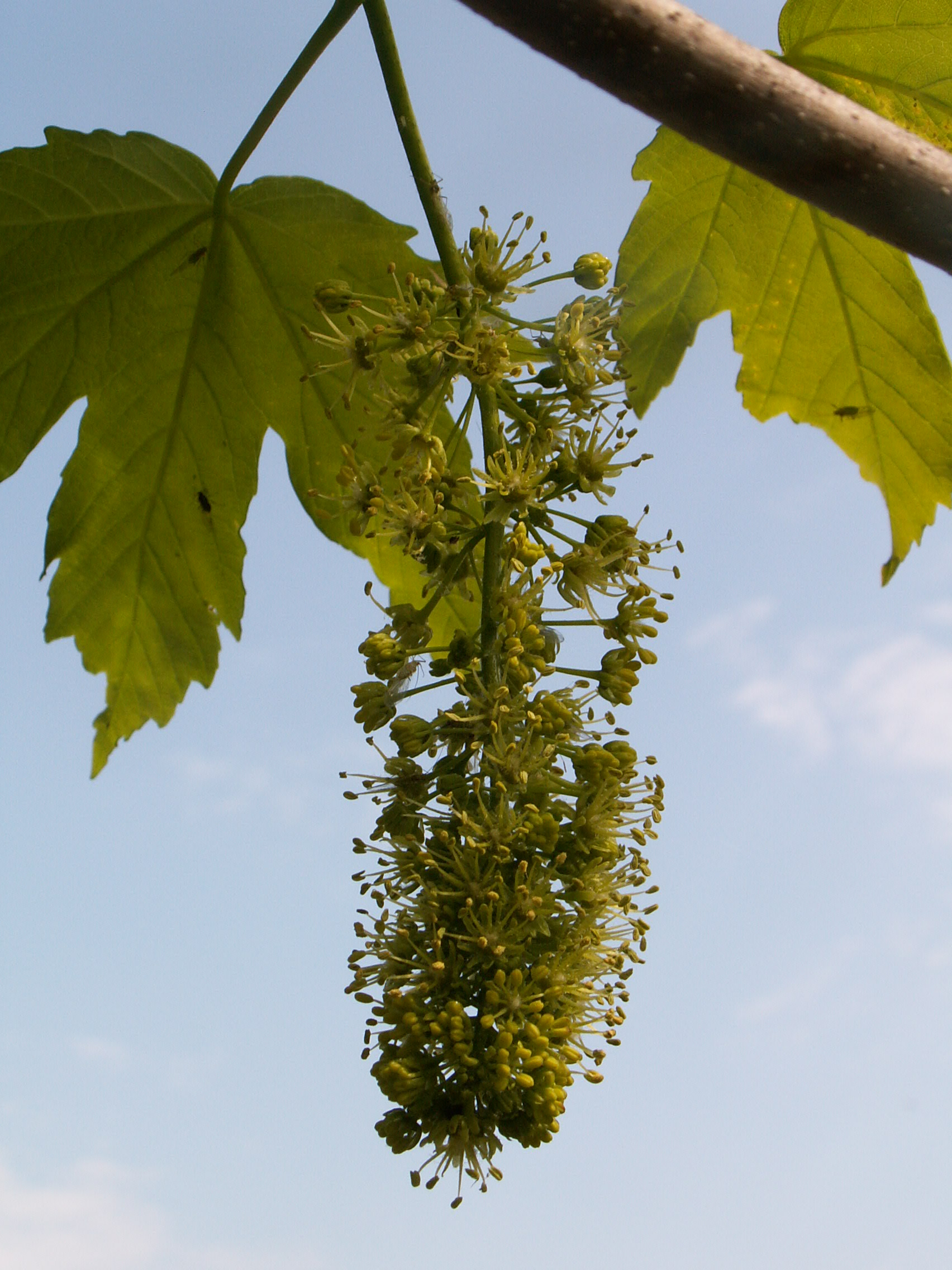 Acer pseudoplatanus, inflorescence. Szczecin Majowe, NW Poland